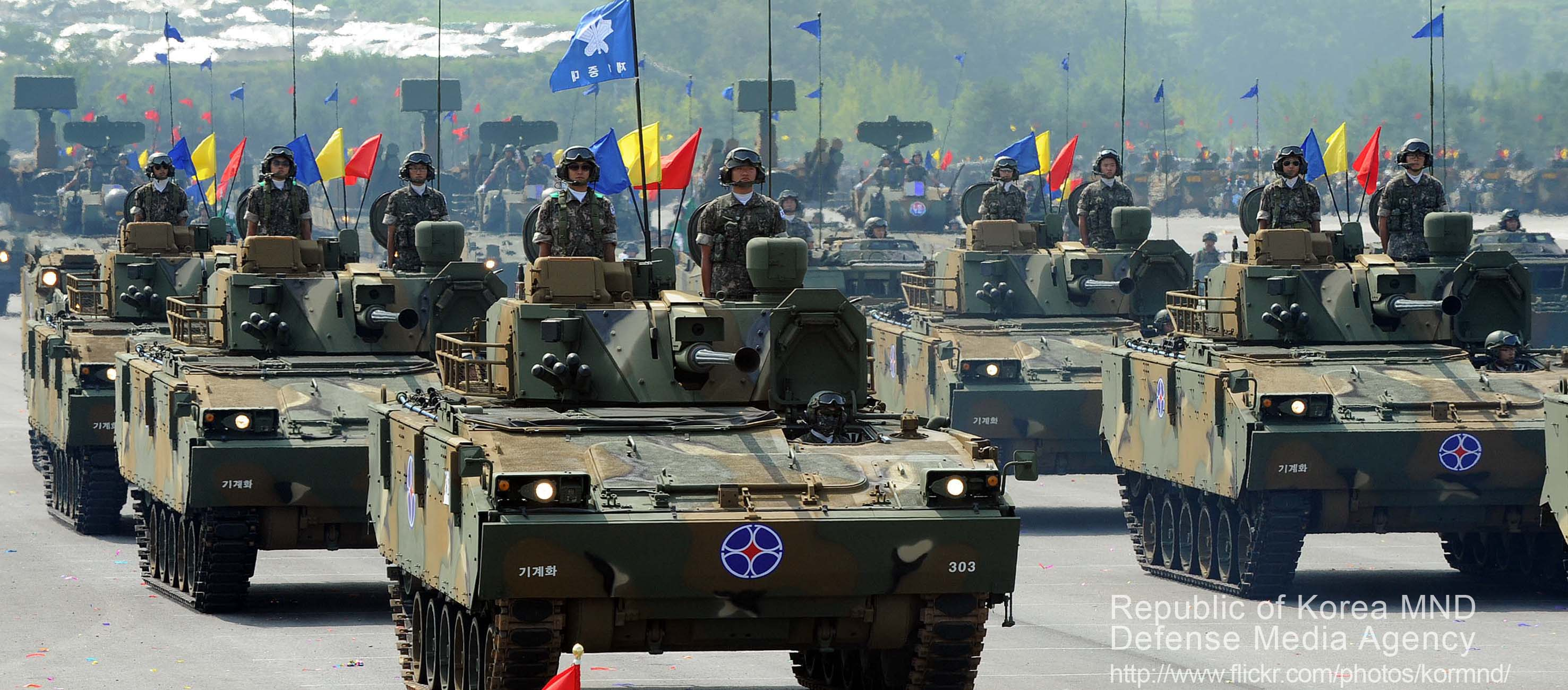 촬영 - 김태형 기자